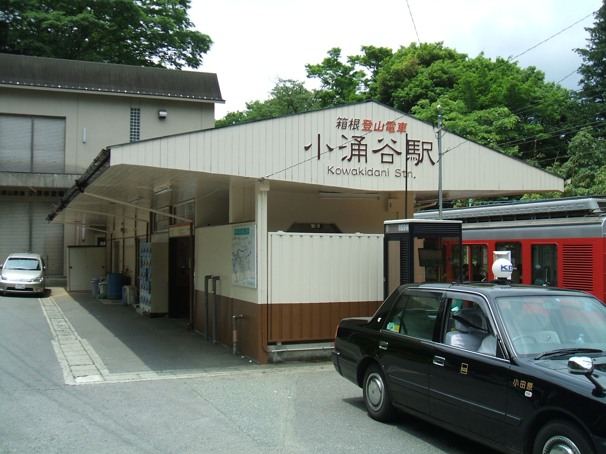 Kowakidani Station, on the Hakone Tozan Line, Hakone, Kanagawa